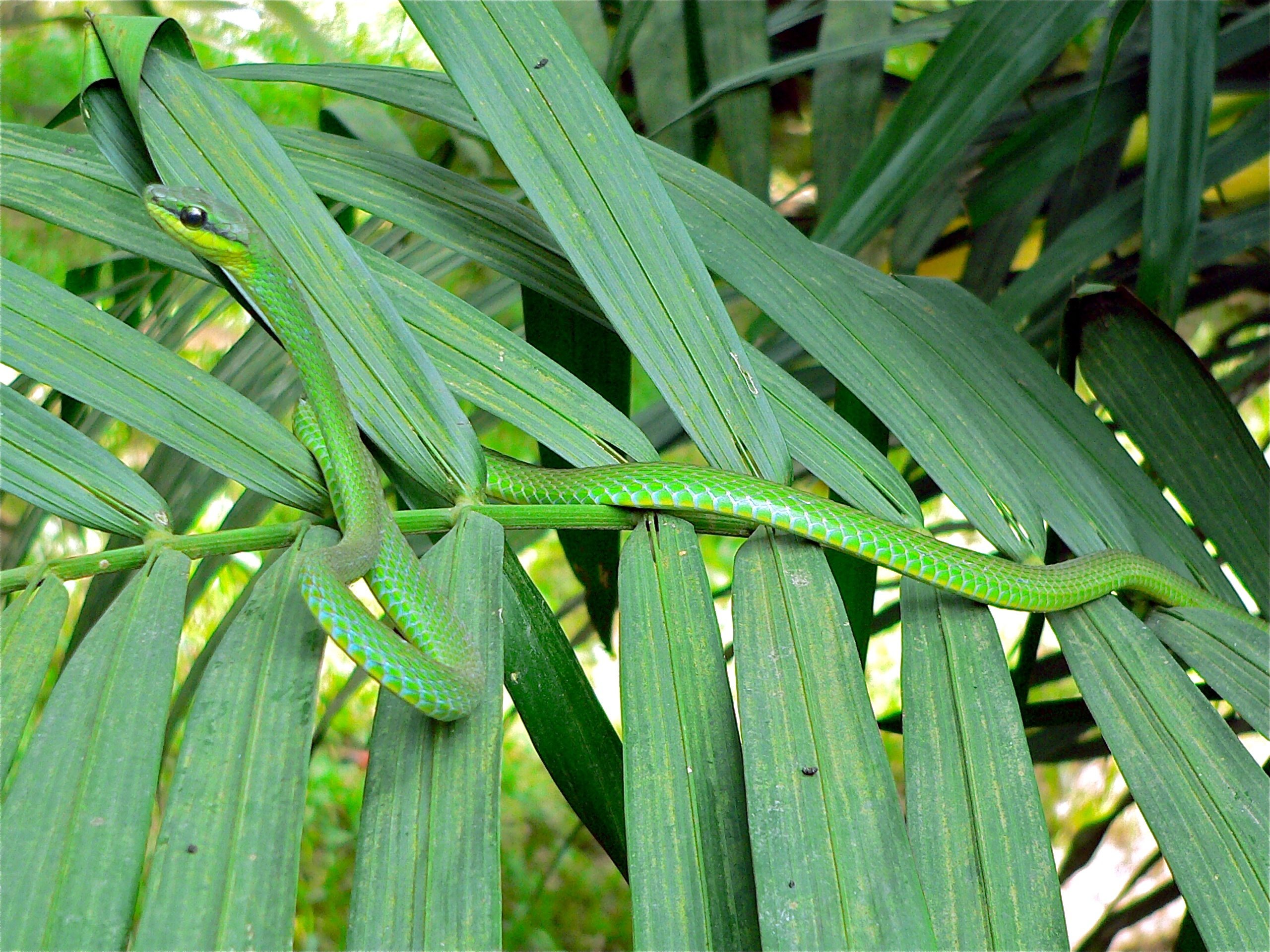 Douala, CAMEROON